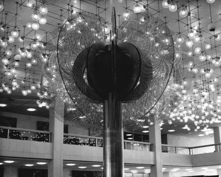 ADN-ZB Kohls 21-4-76 Berlin: Palast der Republik-Blick in das Foyer, mit seiner Plastik aus farbigem Glas und Metall.